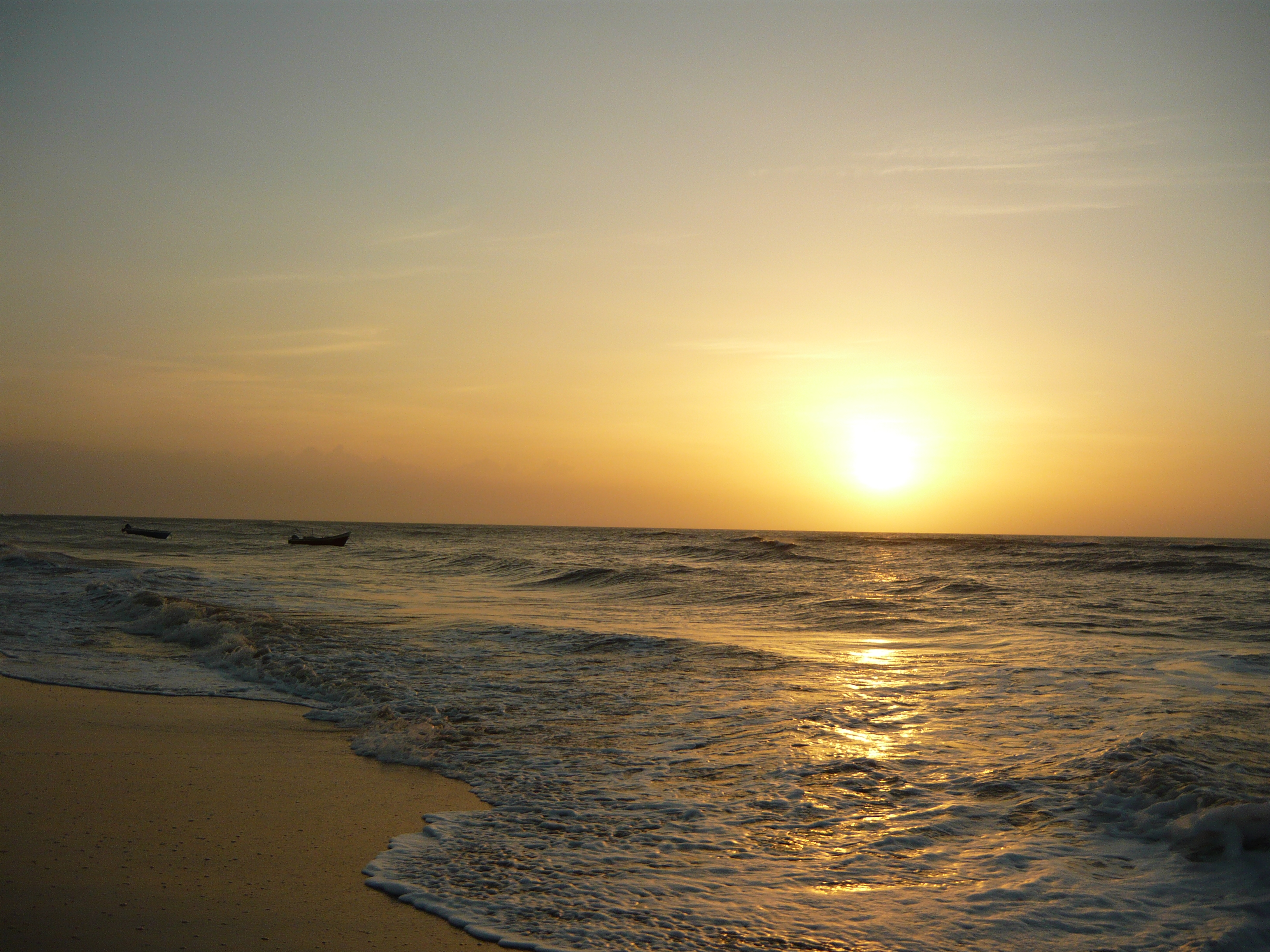 Esta fotografía fue tomada en el municipio colombiano con código 44001.